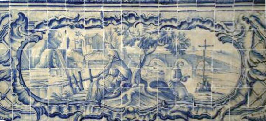 Detalhe de painel de azulejos pintados no Convento de Santo Antônio de Cairu